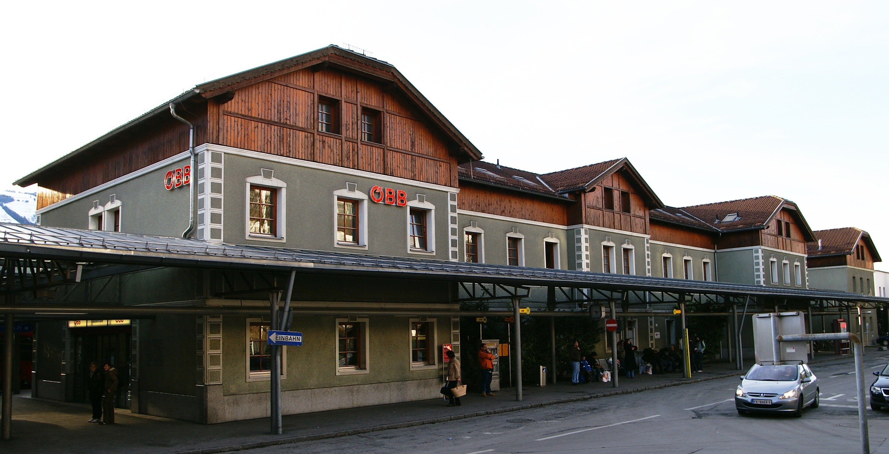 ÖBB Bahnhof Rückseite in Bludenz.